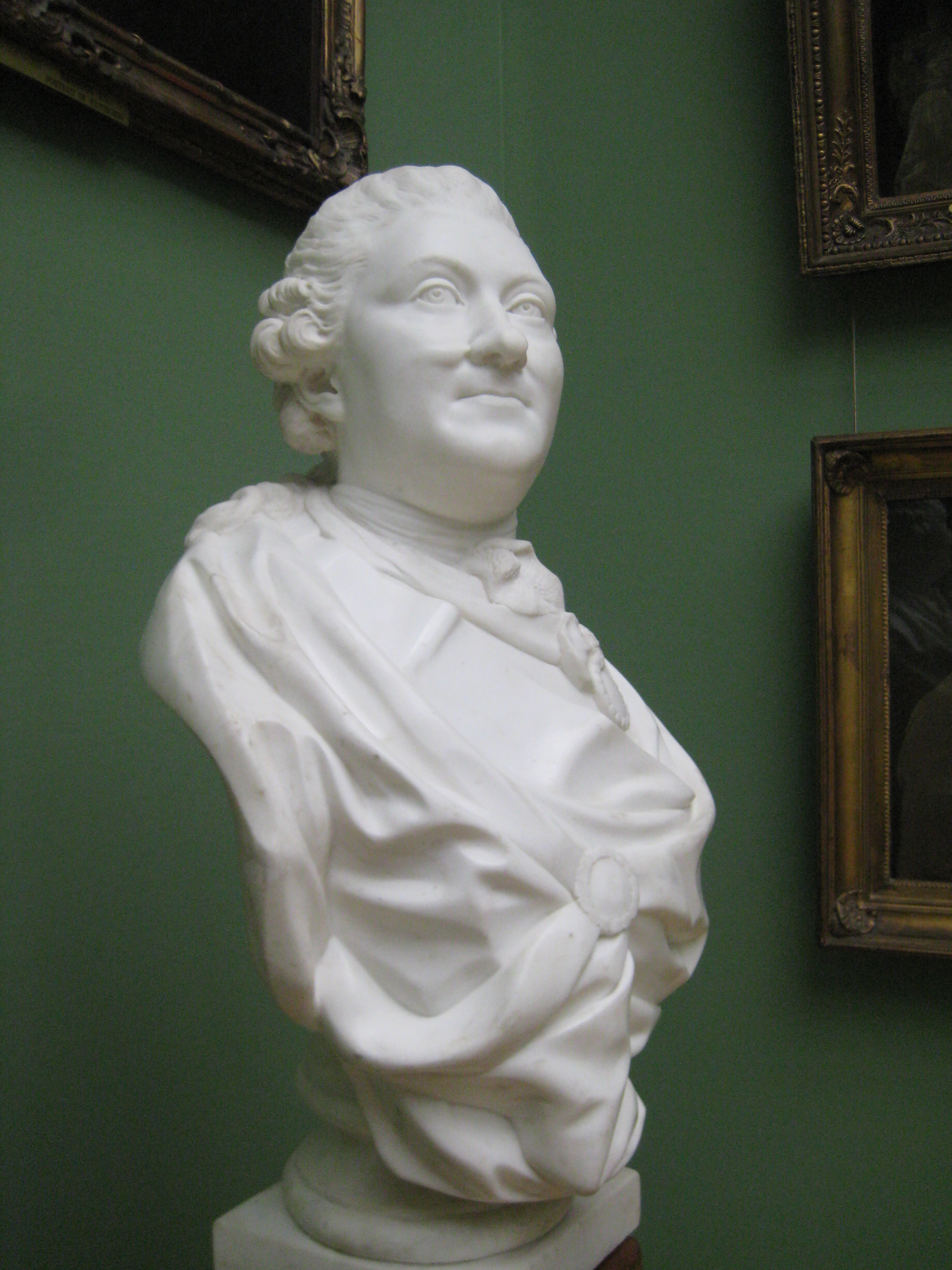 Алексей Орлов-Чесменский. 1778. Бюст работы Ф. Шубина. ГТГ